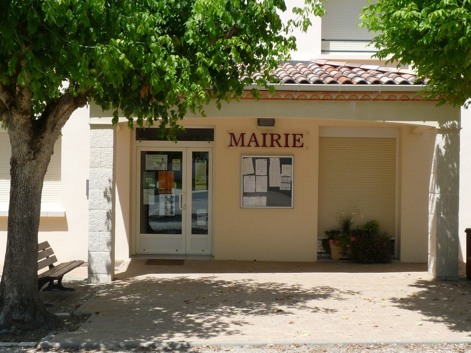 Mairie de Loubès-Bernac, Lot-et-Garonne, France